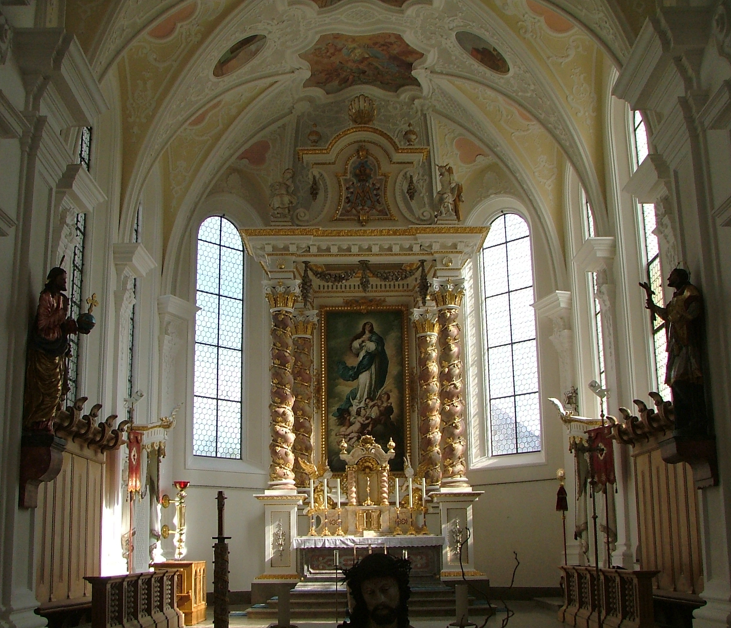 Spiralsäulen